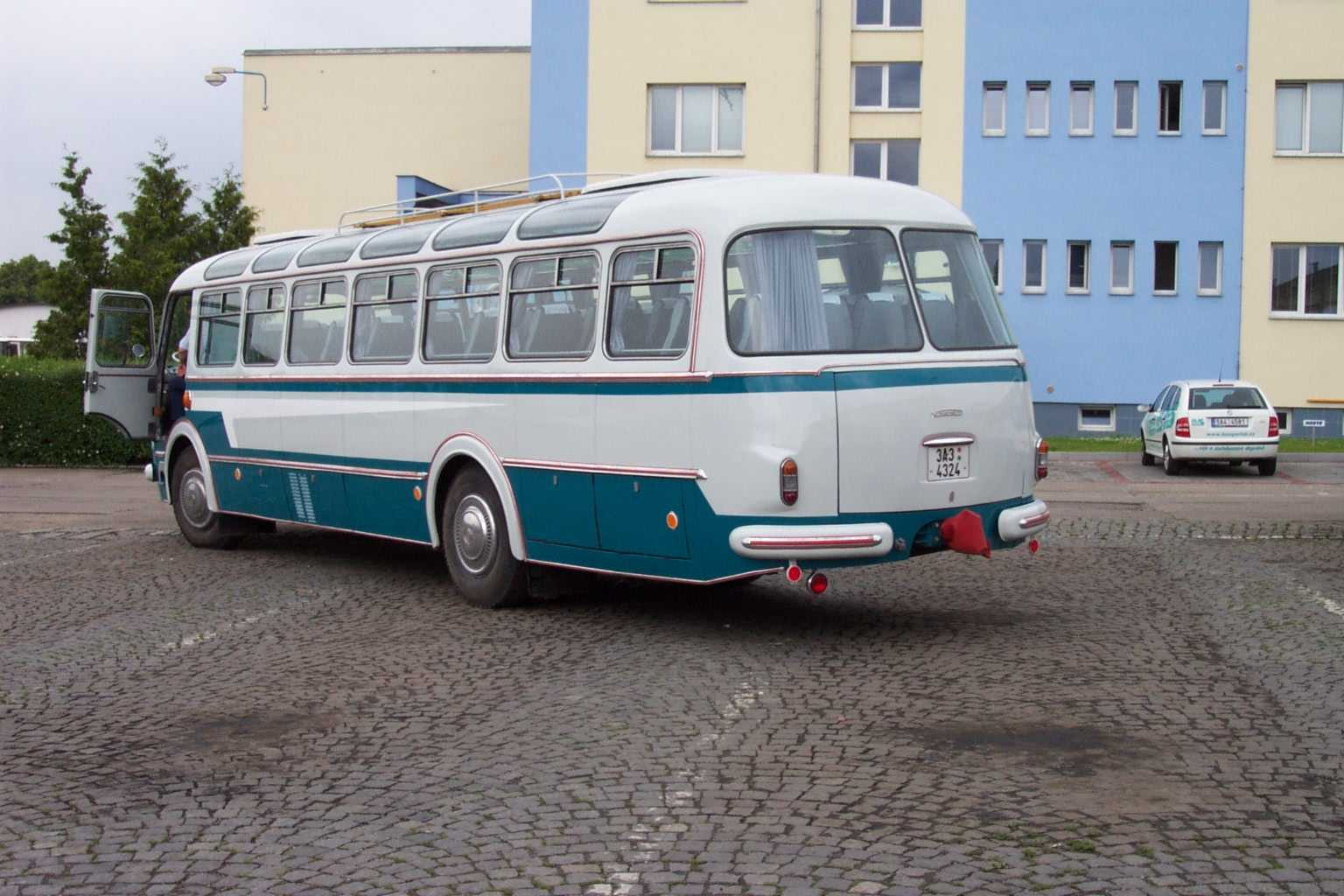 Beroun, bus type RTO (long journeys version) - Autobus typu RTO (zájezdová verze)